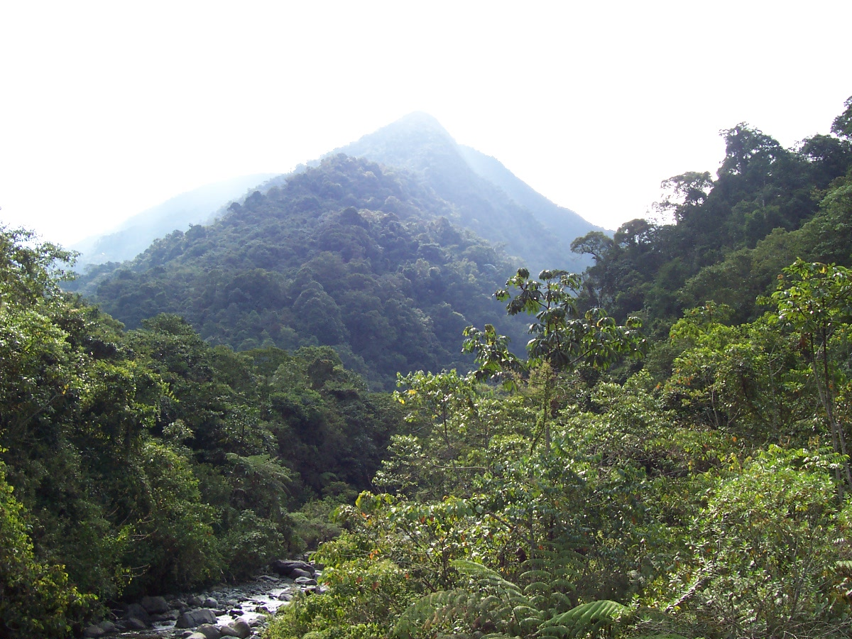 Montañas del Corregimiento de Pance, zona rural de Cali, Colombia